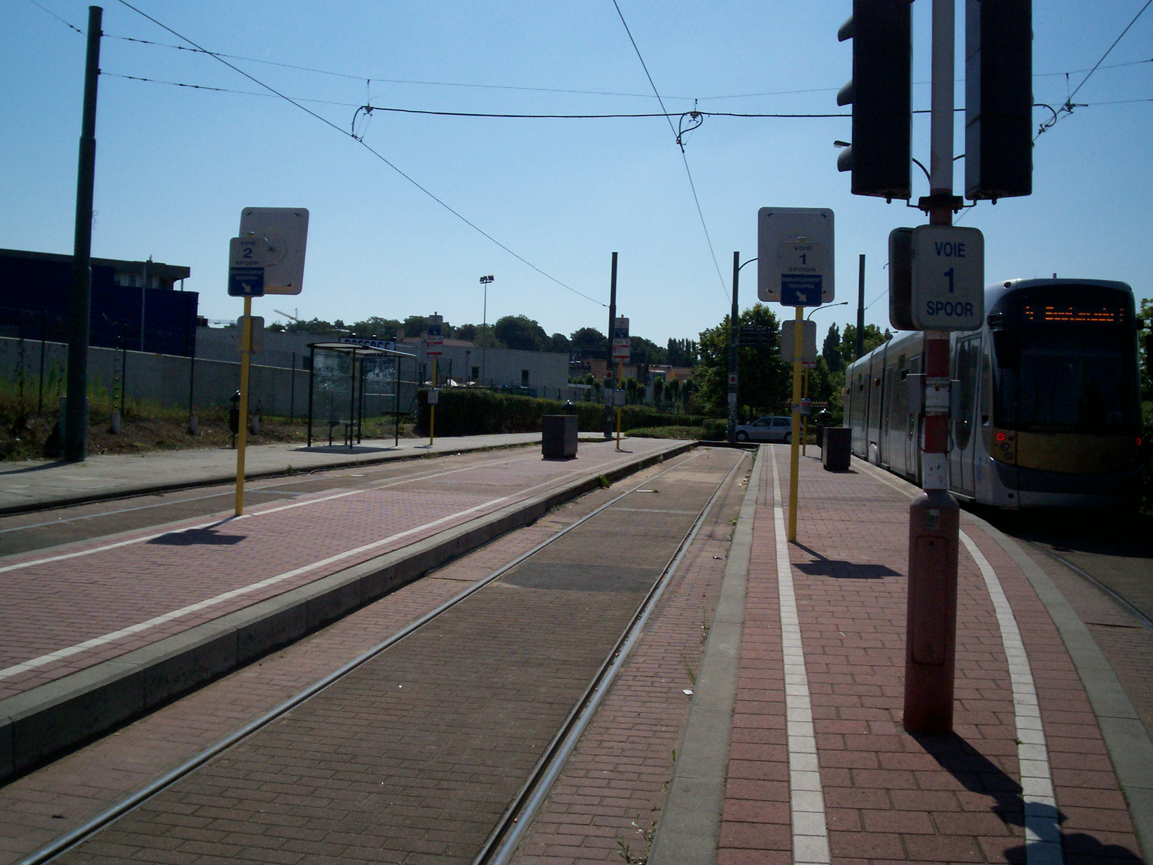 Vue plus générale du terminus Stalle P où se situe à gauche, un T 3000 de la ligne 4